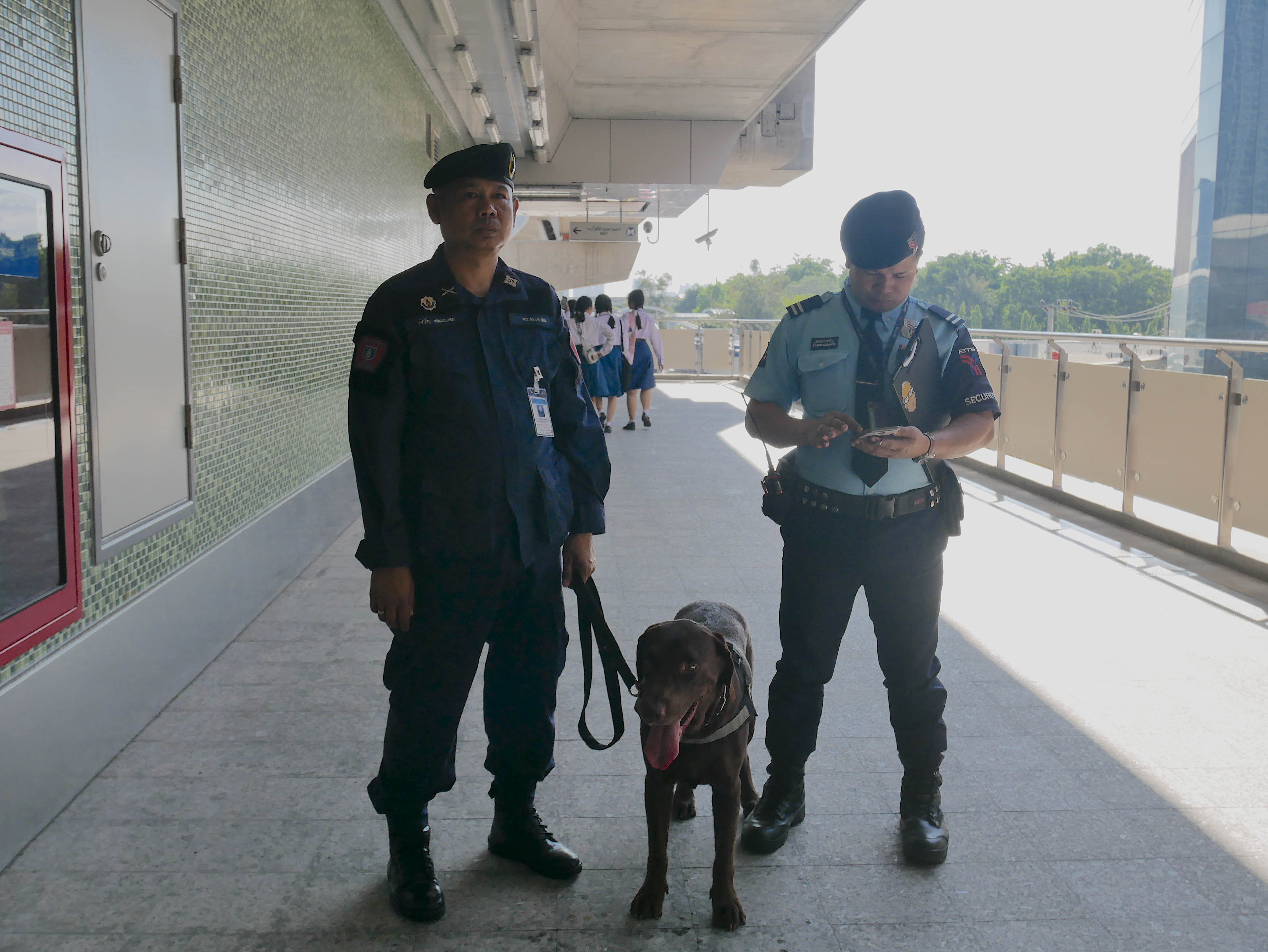 เจ้าหน้าที่ นำสุนัข K-9 มาปฏิบัติหน้าที่ ในการตรวจสอบวัตถุระเบิด ที่สถานีห้าแยกลาดพร้าว N9 ในการทดสอบการเดินรถ โดยมีท่านผู้ว่าฯกรุงเทพมหานคร